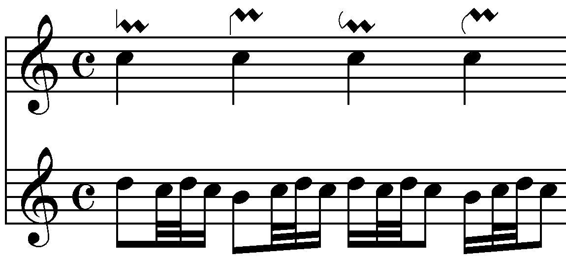 Various mordents